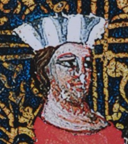 Kníže Oldřich